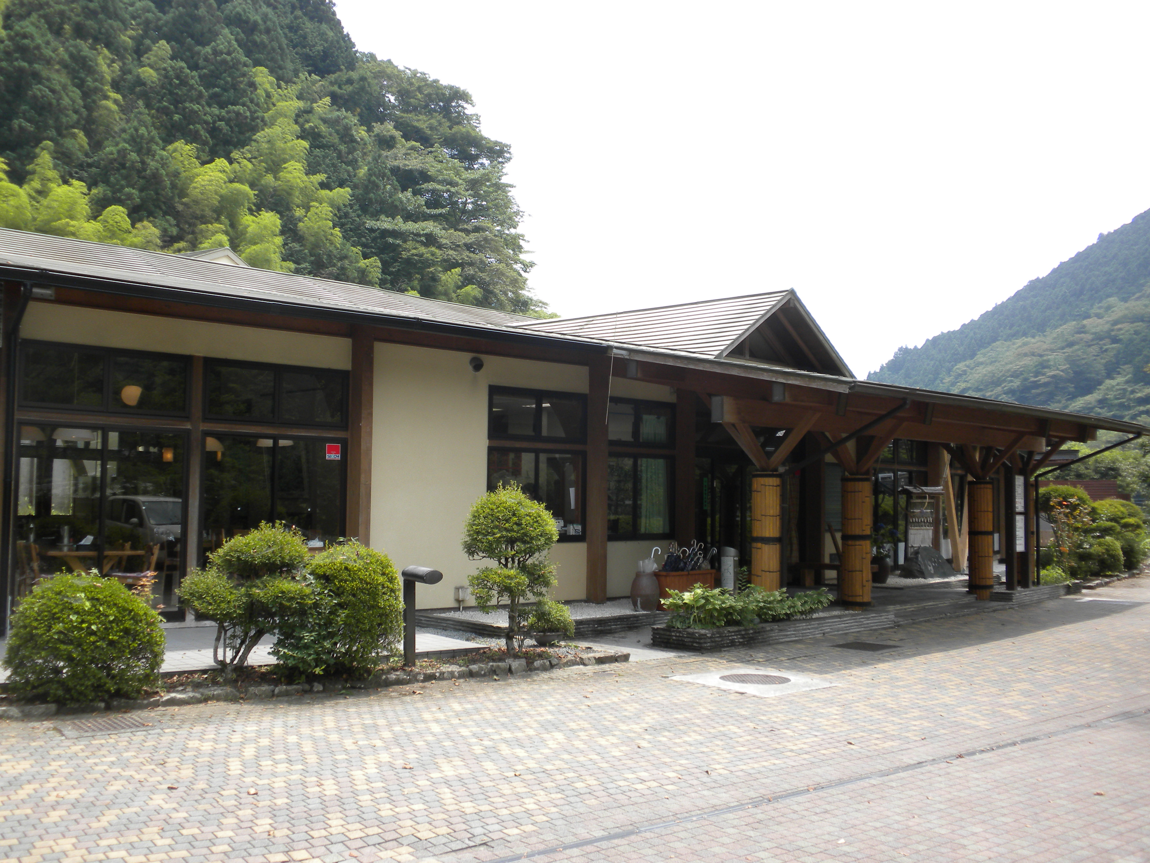 新稲子川温泉ユートリオ